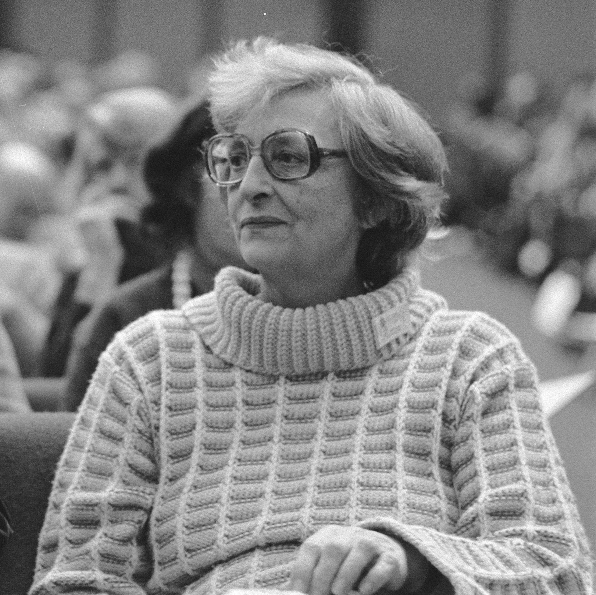 Collectie / Archief : Fotocollectie Anefo Reportage / Serie : [ onbekend ] Beschrijving : Verkiezingscongres PvdA in Congrescentrum van RAI, partijvoorzitter Max van der Berg in gesprek met Liesbeth den Uyl Datum : 26 februari 1981 Locatie : Amsterdam, Noord-Holland Trefwoorden : CONGRESCENTRA, GESPREKKEN, congressen, verkiezingen Persoonsnaam : Berg, Max van den, Uyl, Liesbeth den Fotograaf : Bogaerts, Rob / Anefo Auteursrechthebbende : Nationaal Archief Materiaalsoort : Negatief (zwart/wit) Nummer archiefinventaris : bekijk toegang 2.24.01.05 Bestanddeelnummer : 931-3448